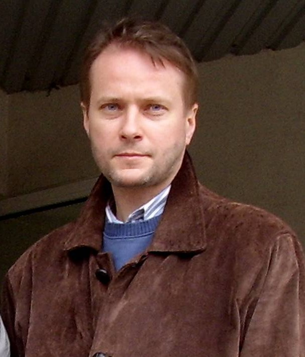 Artur Żmijewski (ur. 10 kwietnia 1966) - polski aktor filmowy i teatralny License on Flickr (2011-01-07): CC-BY-SA-2.0